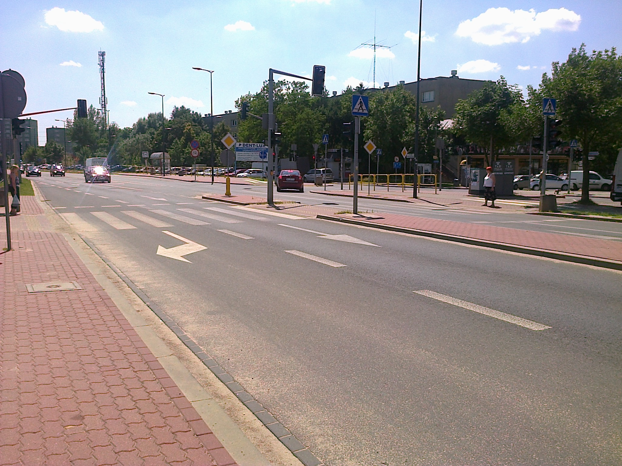 Ulica Sobieskiego przy skrzyżowaniu z Husarską